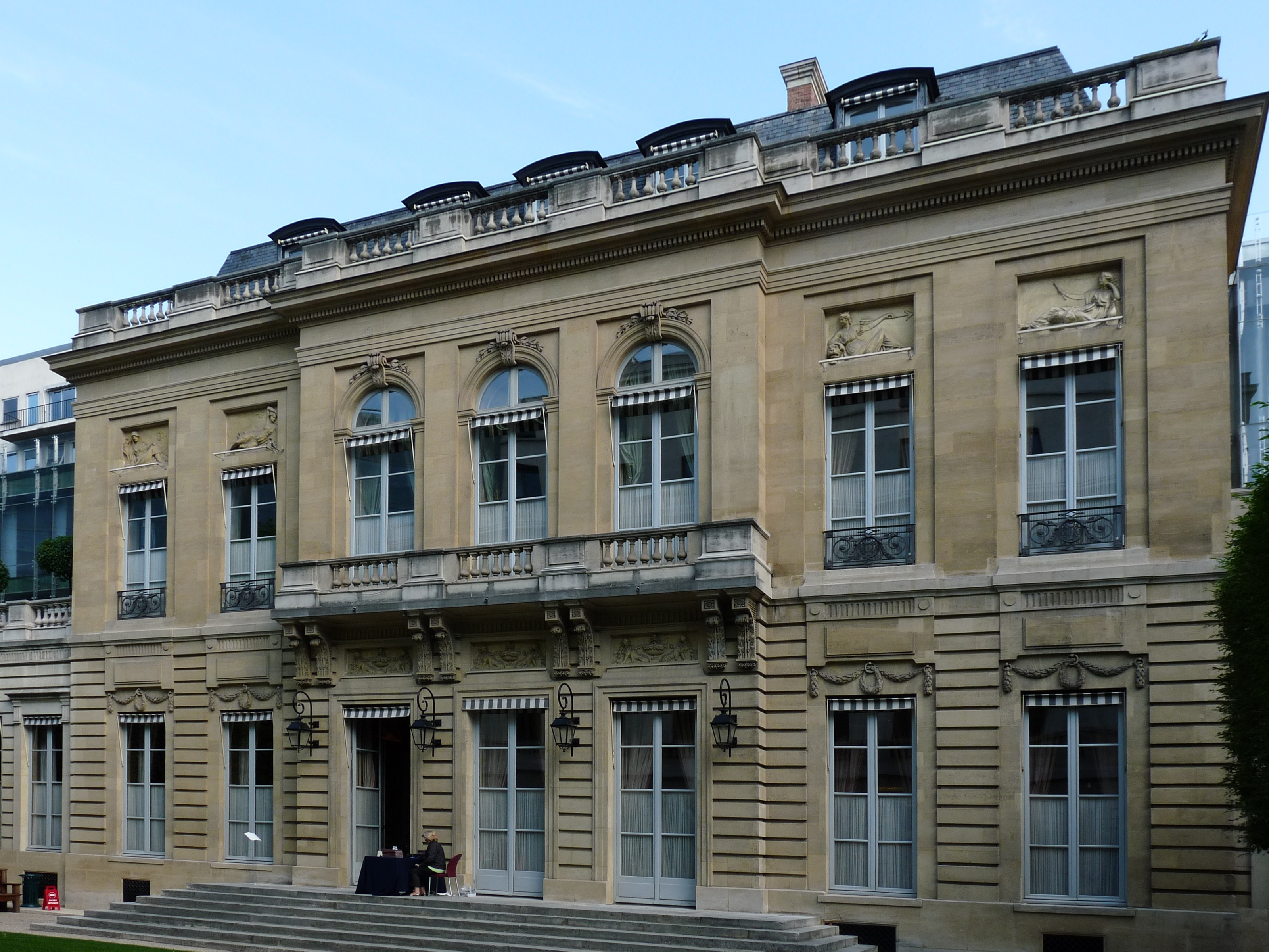 L'hôtel de La Vaupalière à Paris, côté jardin